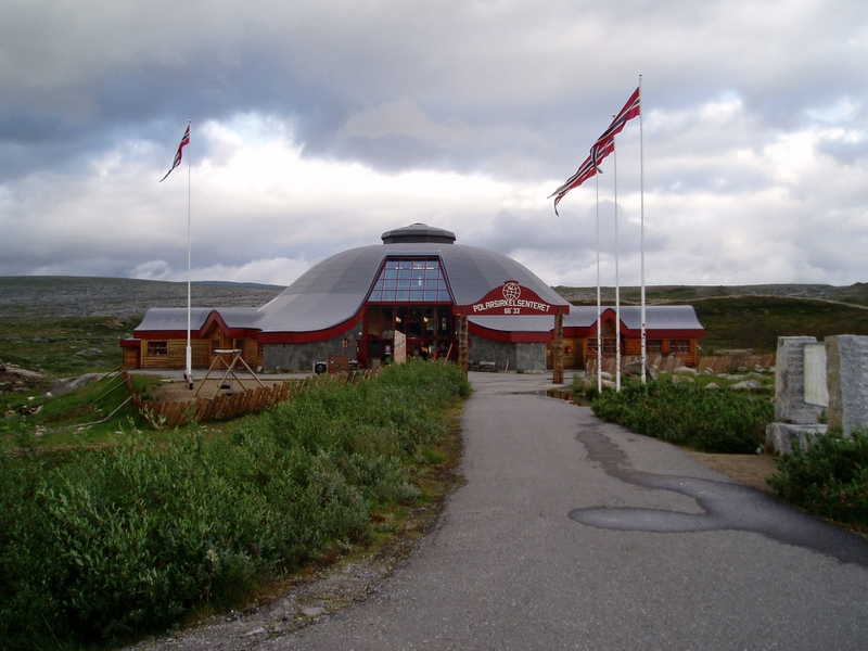 Polarsirkelsenteret på Saltfjellet.Translation: Arctic circle center on Saltfjellet, Norway.